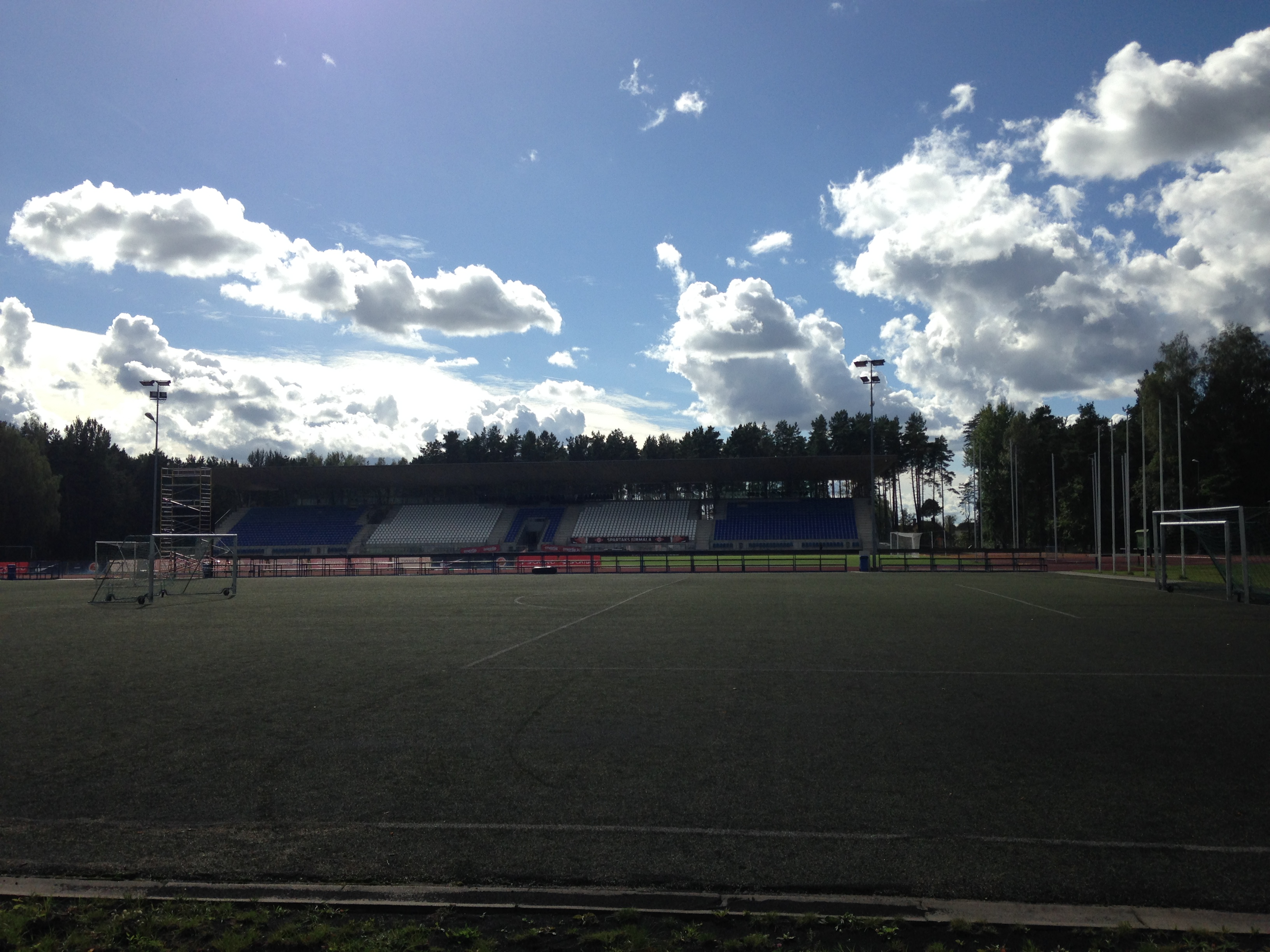 Jūrmalas pilsētas stadions "Sloka", 04.09.16